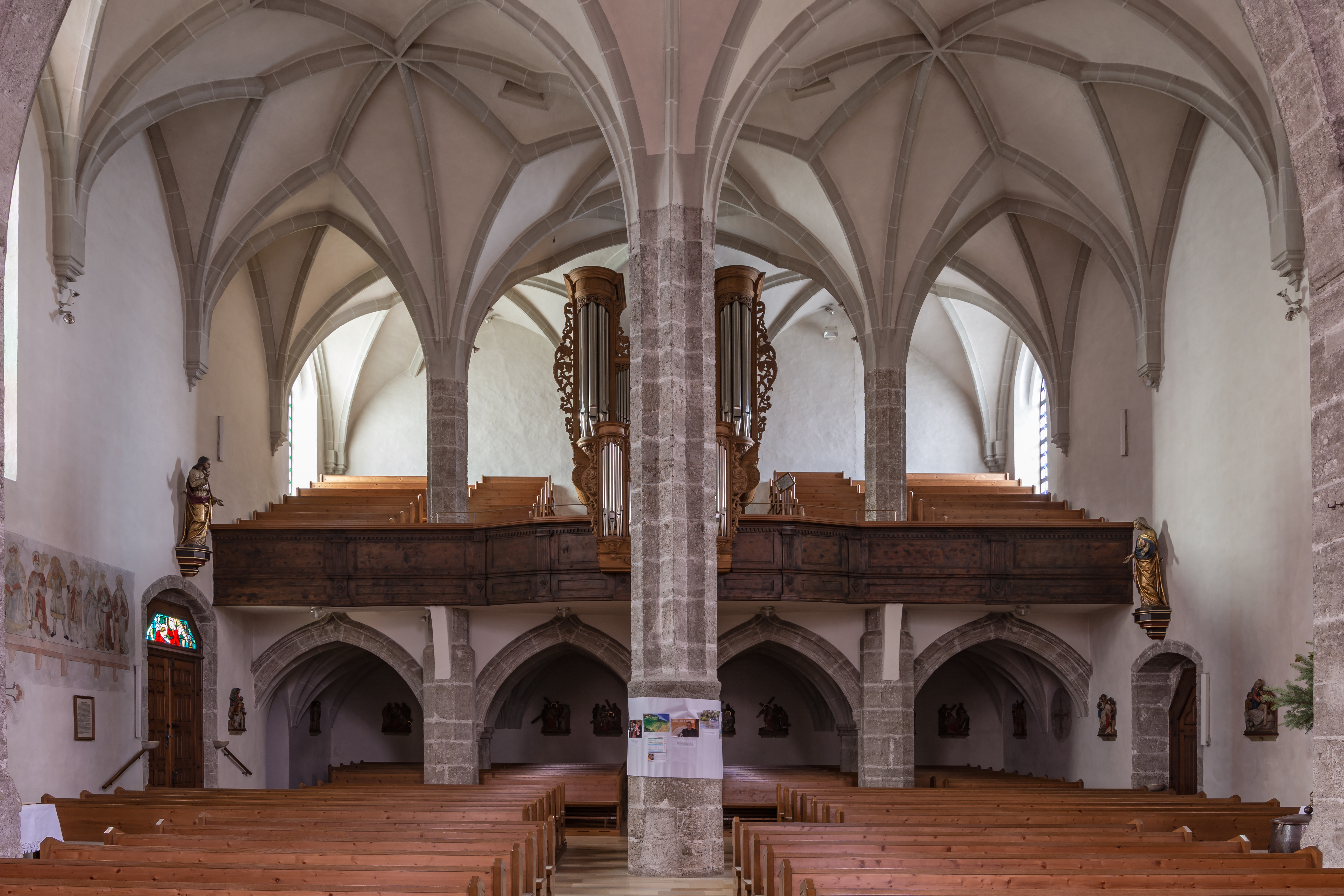 Kath. Pfarrkirche hl. Valentin mit Friedhofsfläche, ehem. Friedhofsportal